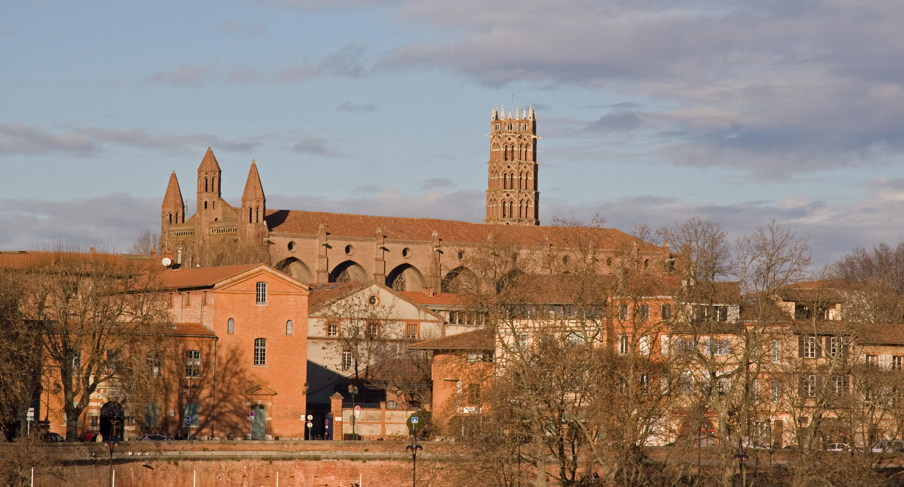 L'église des Jacobins depuis la Garonne Toulouse